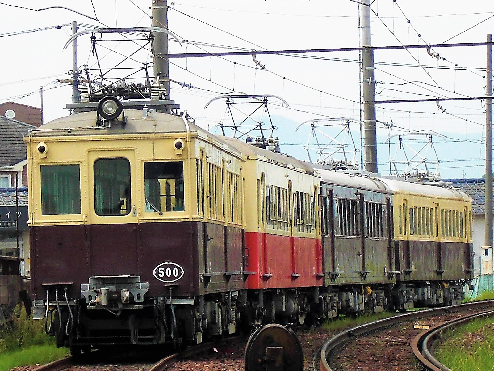 高松琴平電気鉄道動態保存電車500号・23号・300号・120号